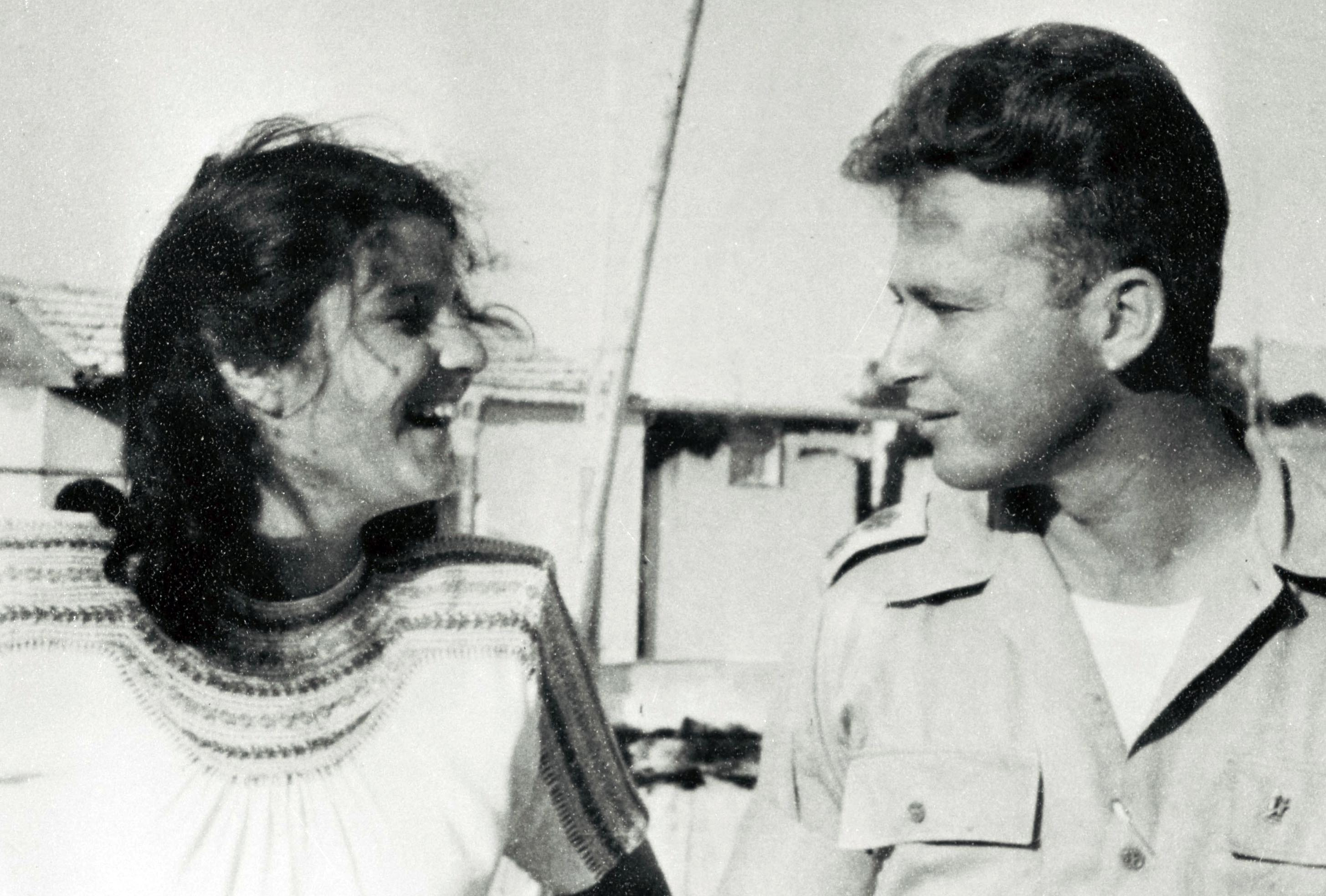 Yitzhak Rabin with is wife Lea. יצחק רבין עם רעייתו לאה. צילום, לעמ. Photo: GPO, 01/05/1948.